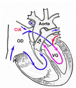 schéma de l'aomalie d'Ebstein